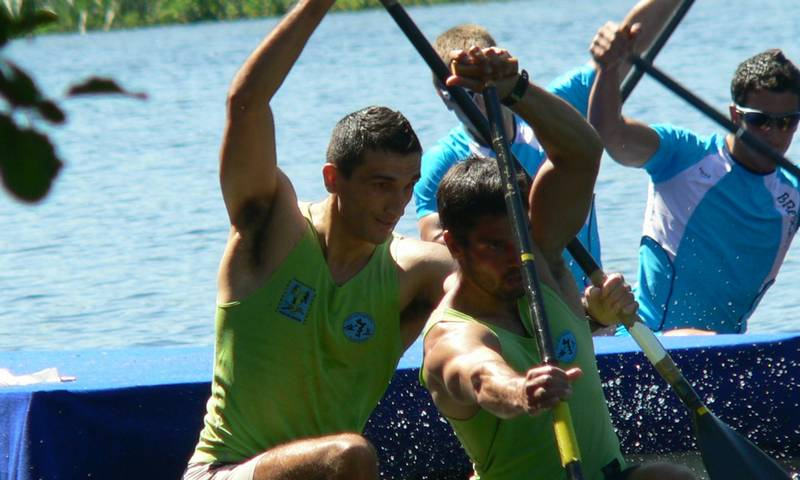 Oscar Graña (izquierda) en el Campeonato de España 2009 con Ramon Ferro